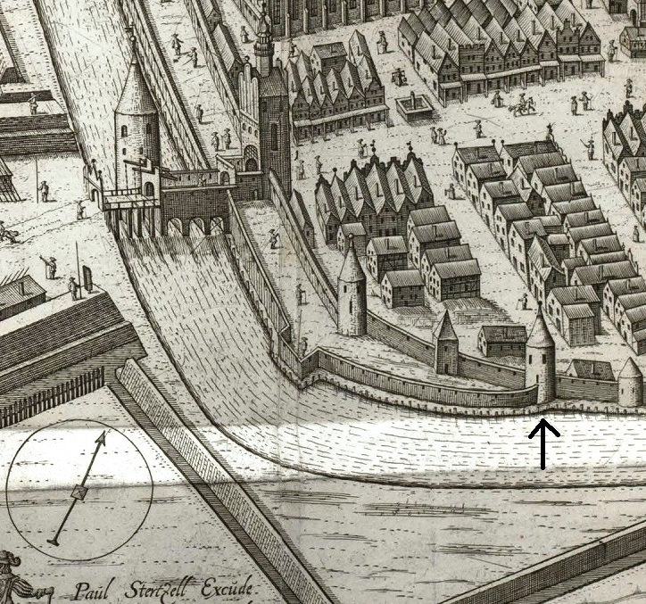 Rossmühlenturm, wieża młyna kieratowego, baszta w Braniewie na miedziorycie Paula Stertzella i Konrada Götke, 1635